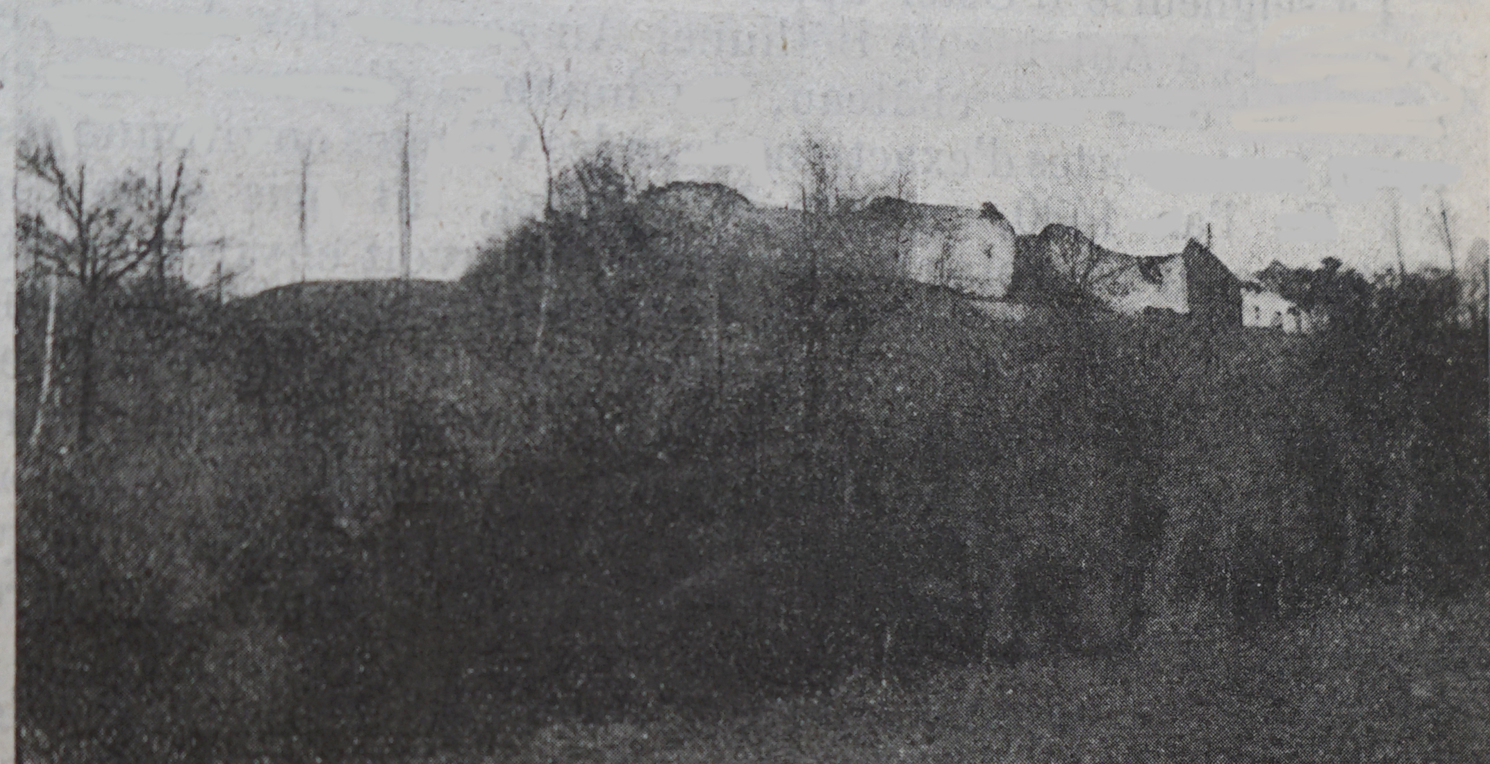 in almanch Matot-Braine 1915-17.